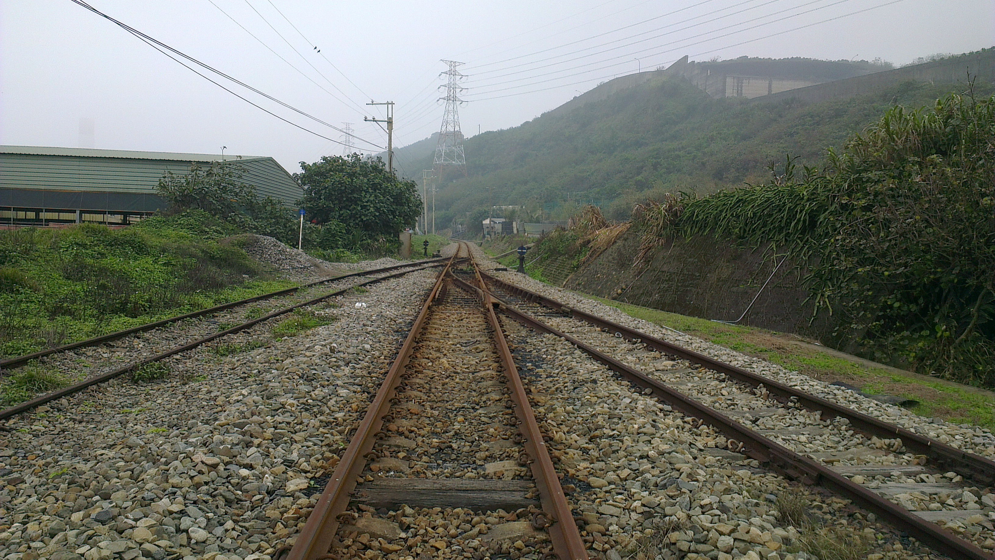 桃林鐵路（臺鐵林口線），18.5 公里鐵樁